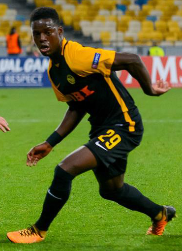 Динамо - Янг Бойз (2:2) фото с матча